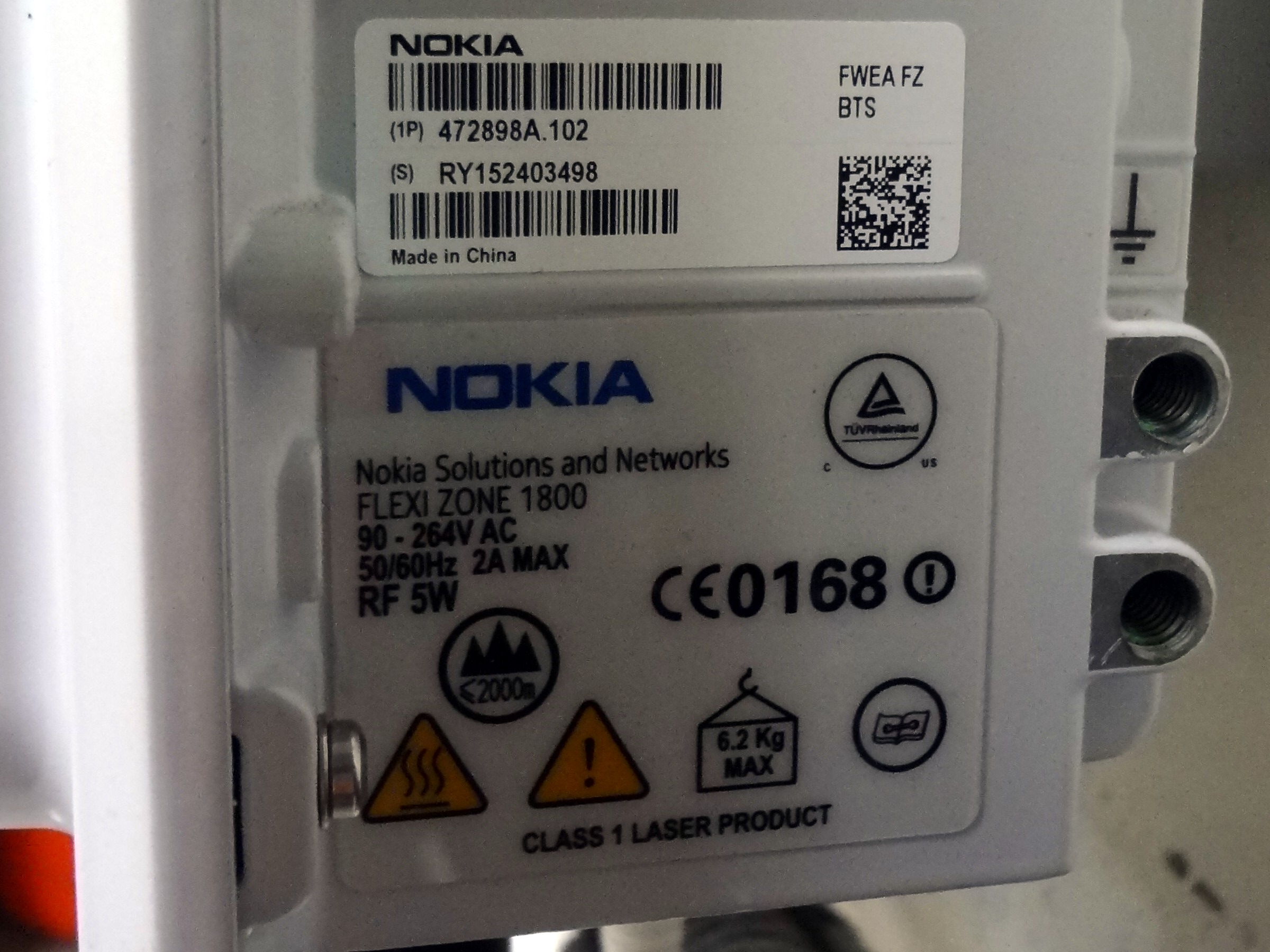 中文（台灣）: 諾基亞行動寬頻基地台Flexi Zone Micro BTS（型號FWEA）規格標籤。